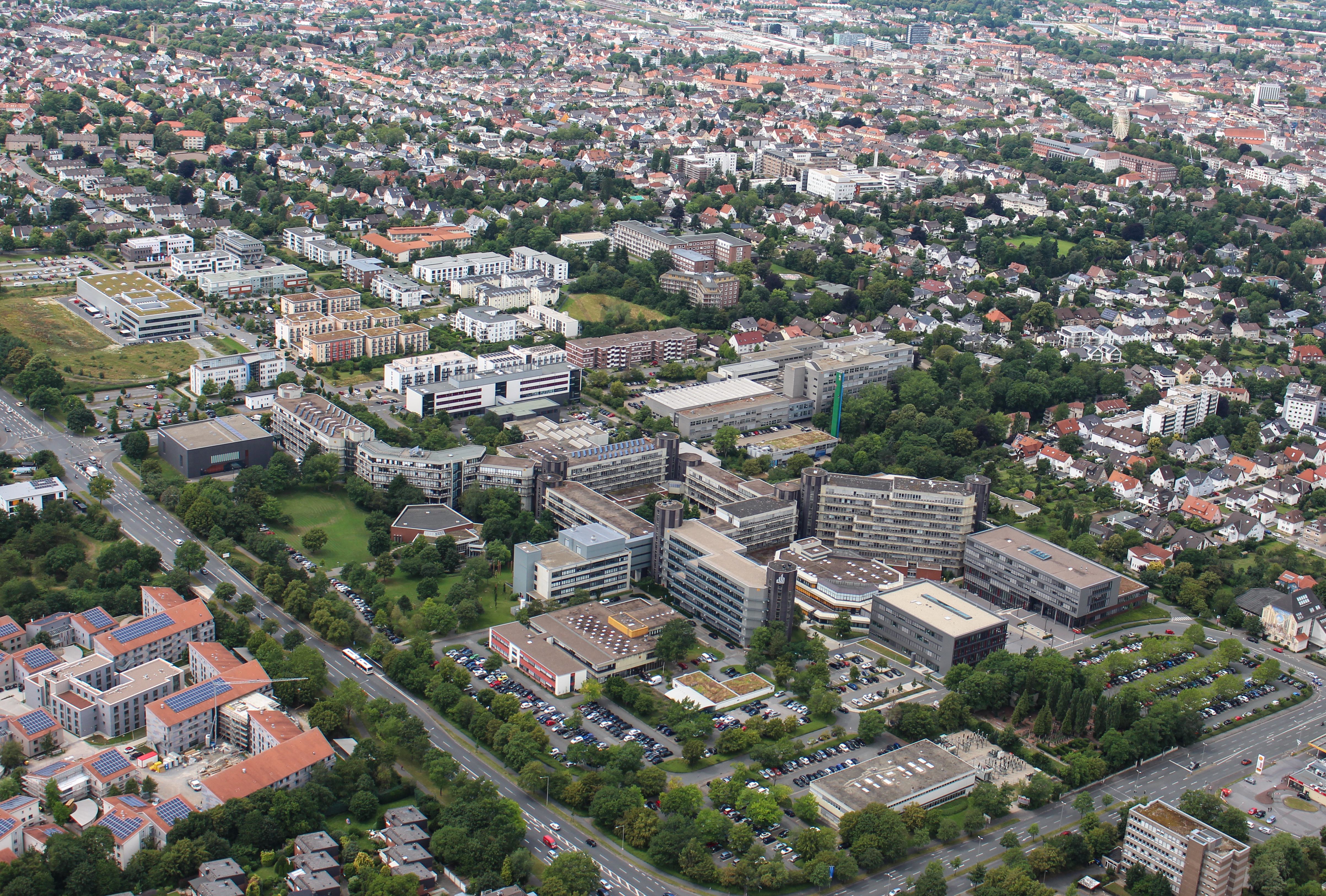 Die Universität Paderborn im Juli 2019.